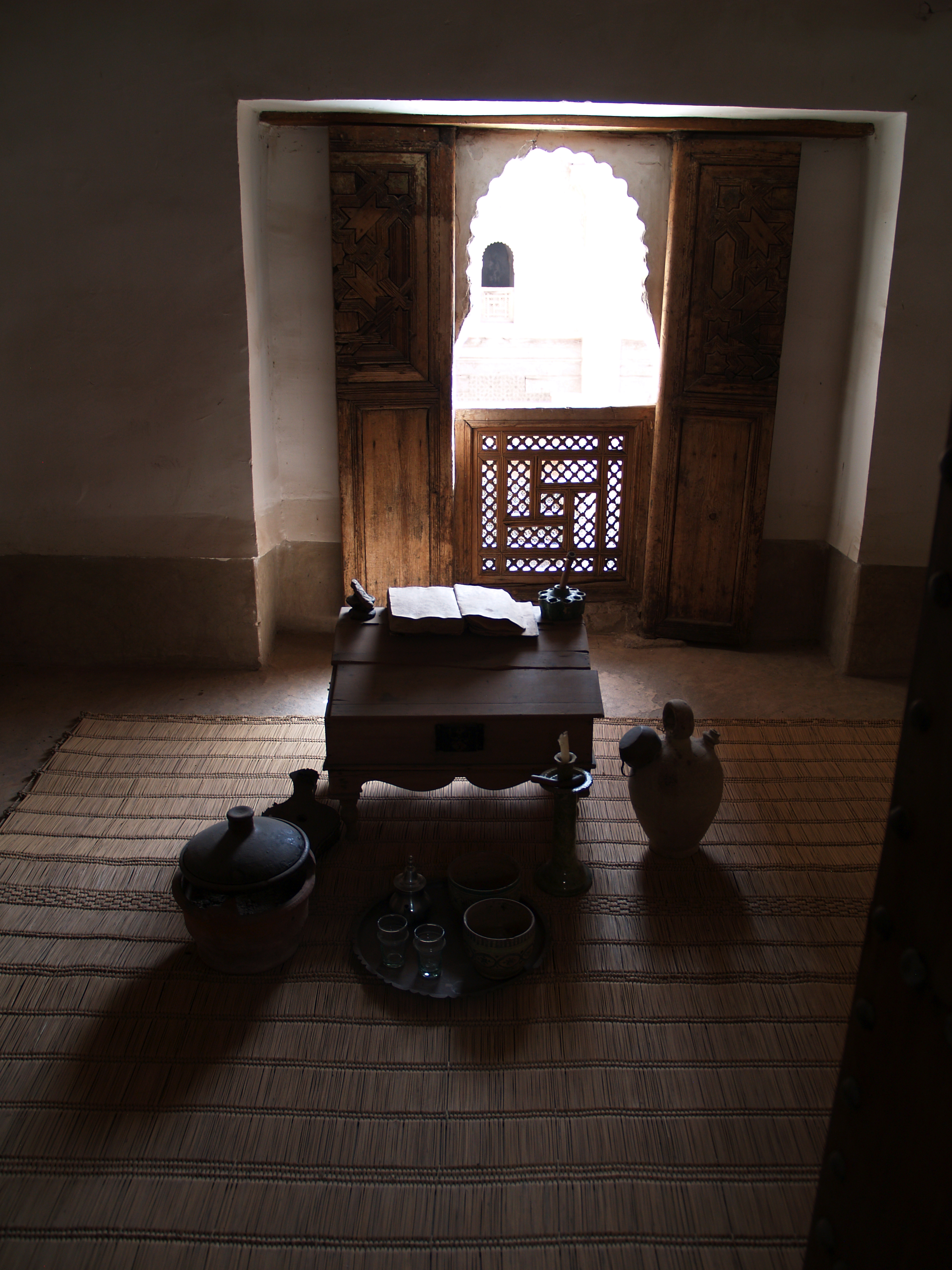 Marrakech. Madrasa ben Yusuf. Residencia de los estudiantes y profesores. Reconstrucción de la celda de un profesor.